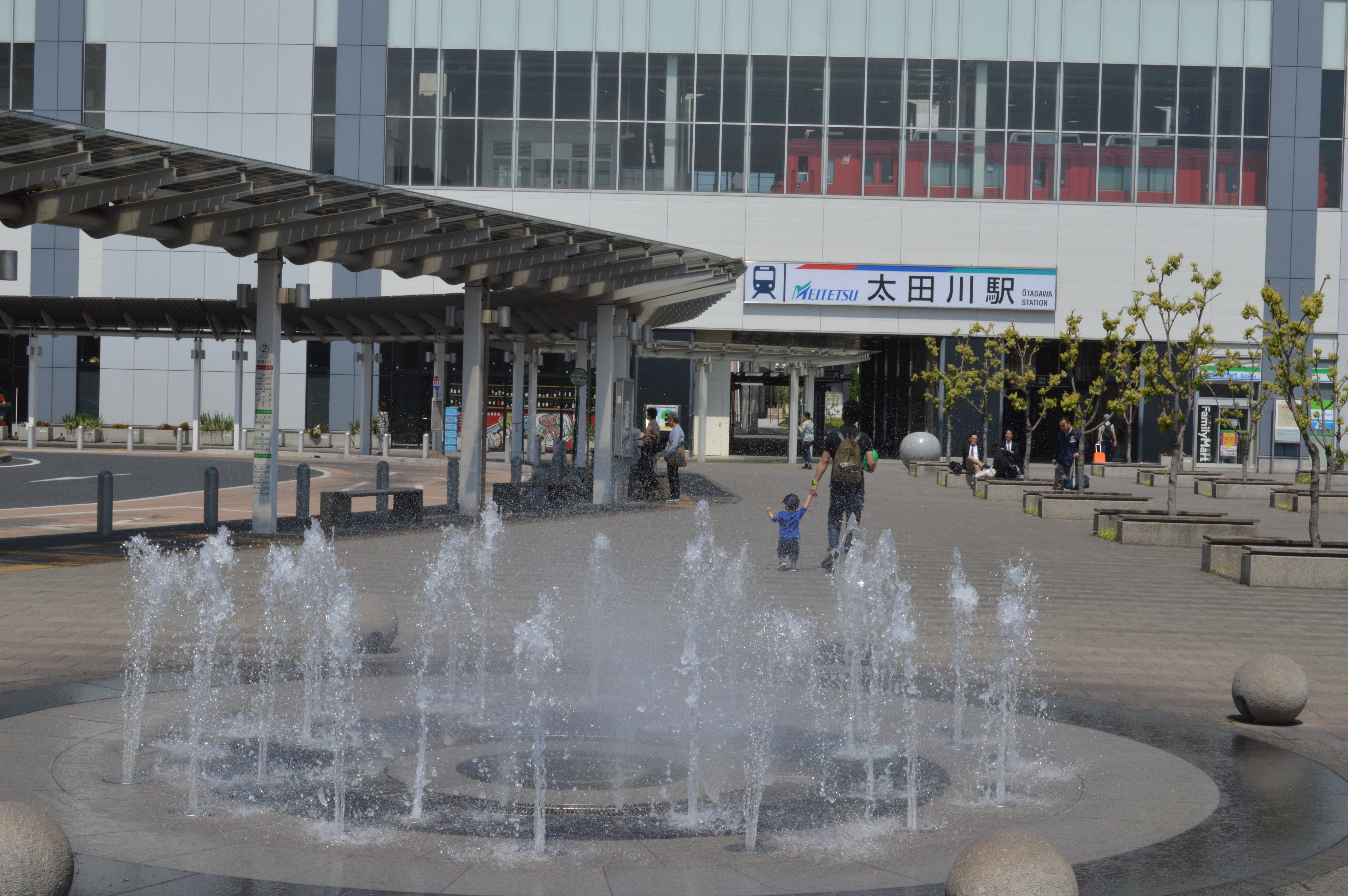 愛知県東海市の名鉄太田川駅東口。